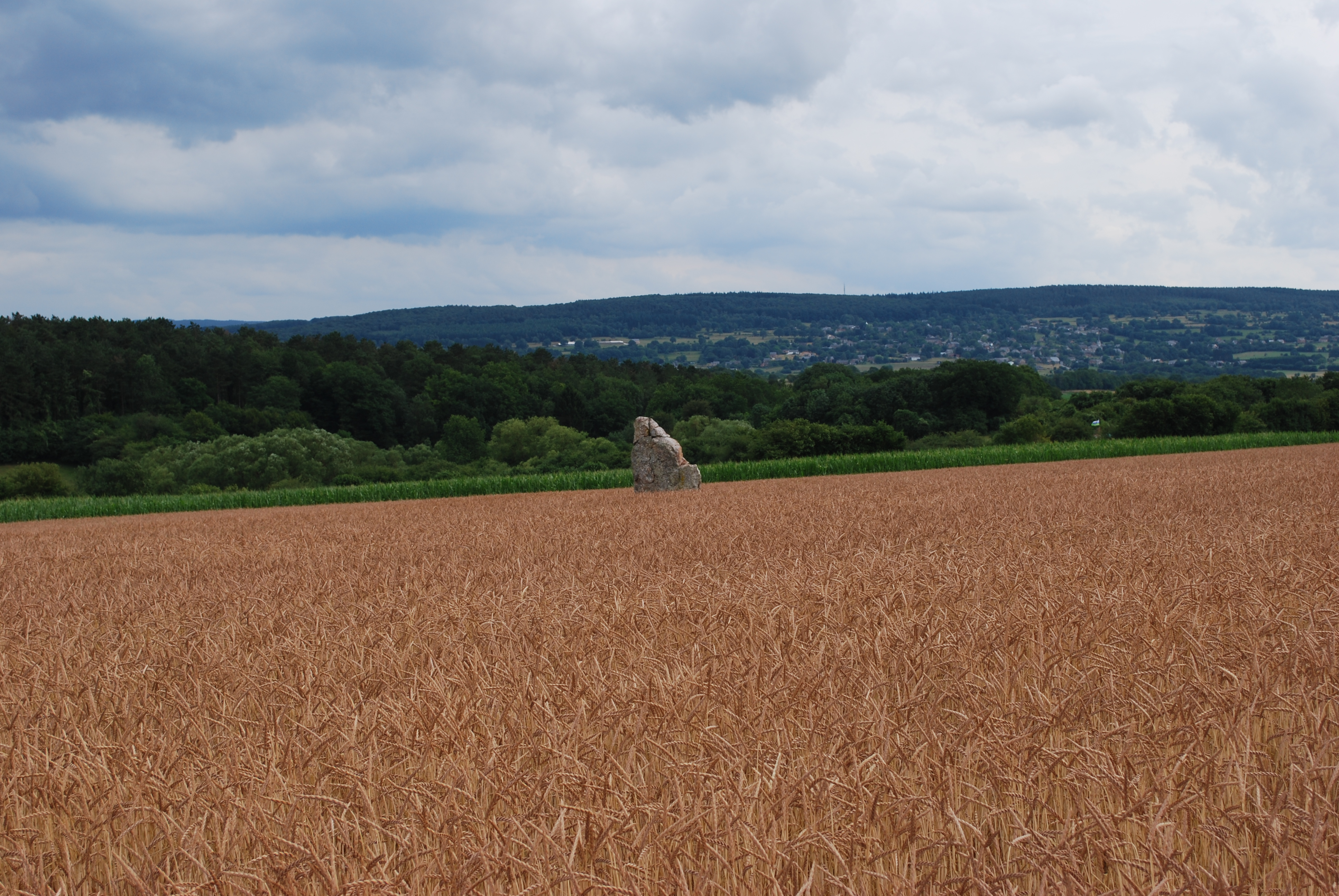 Le menhir d'Ozo, près d'Izier (Durbuy).